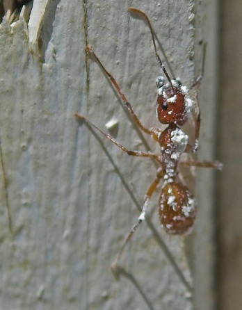 Когда диатомит измельчают до определенного размера, микроскопическая внешняя оболочка из частиц диоксида кремния становится острой. Эти частицы "разрезают" наружный хитиновый слой насекомых, вызывая их гибель. Таким образом, уничтожение вредителей происходит совершенно нетоксичным образом. Поскольку вред насекомым наносится физически, а не химически, вредители не могут выработать устойчивость к диатомиту. В то время, как кизельгур смертелен для насекомых, он совершенно безобиден для человека и животных, так как не может повредить упругий верхний слой кожи.